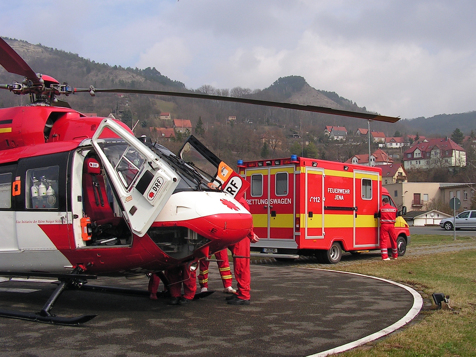 Die Deutsche Rettungsflugwacht DRF geht auf eine Initiative der Björn Steiger Stiftung zurück: hier ein Rettungshubschrauber Eurocopter BK-117B-2 für die Luftrettung Foto 2005 Wolfgang Pehlemann Wiesbaden PICT0018